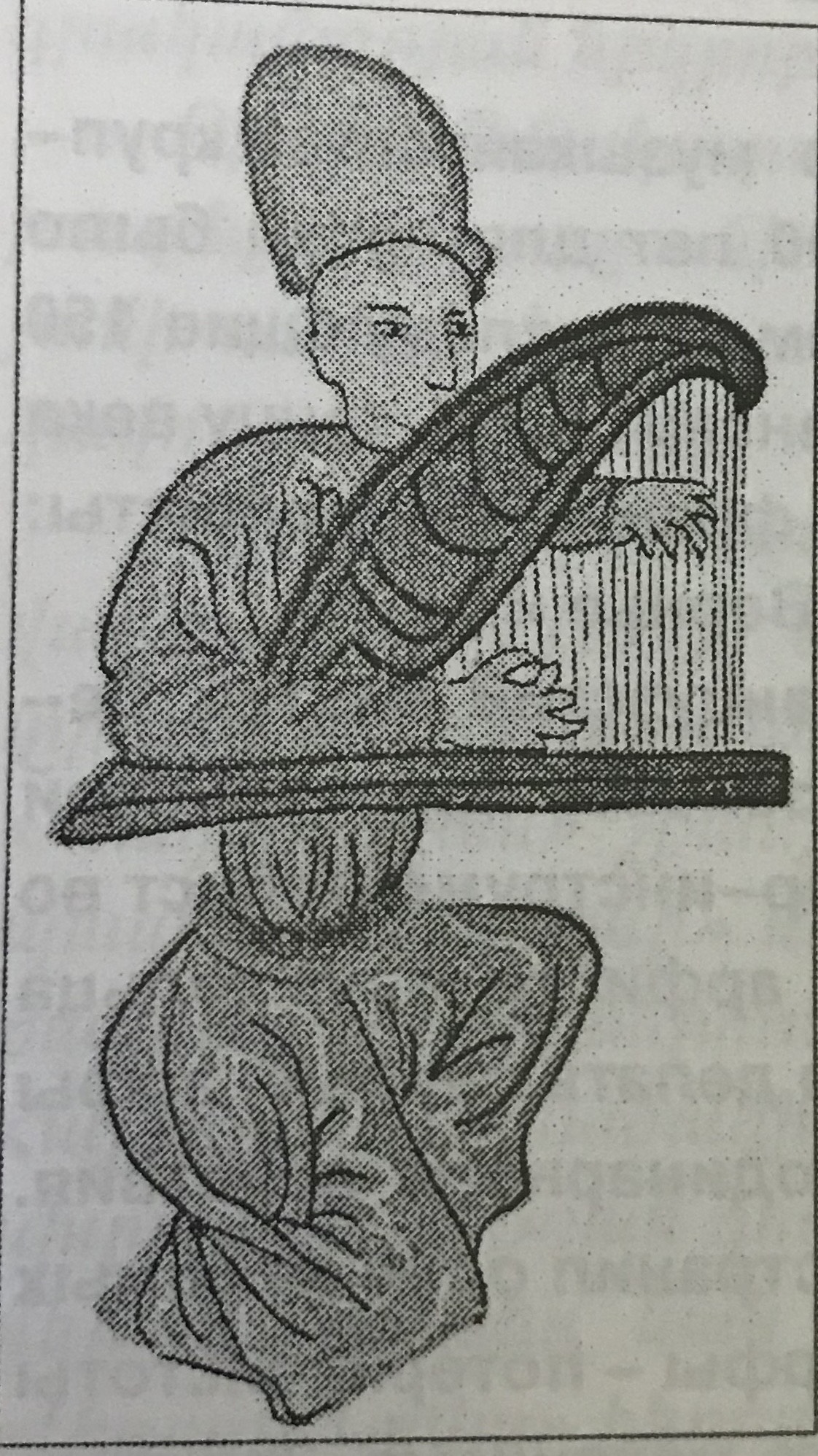 Տավիղ